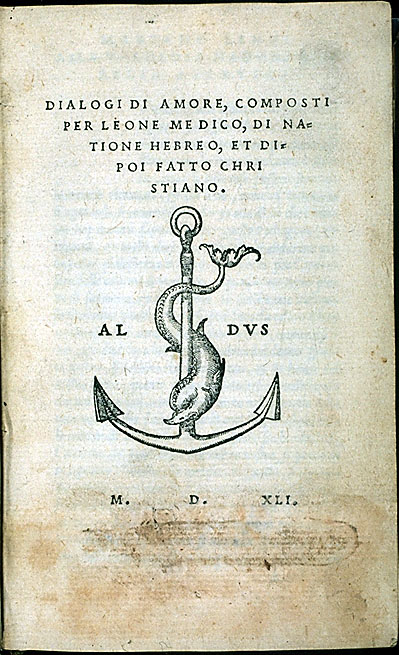 Titelblatt eines frühneuzeitlichen Druckes der Dialoghi d’amore von Jehuda ben Isaak Abravanel. Druck von Paulus Manutius, Venedig 1541, mit dem Druckerzeichen der Aldus-Presse. Der Titel gibt die Behauptung wieder, Jehuda sei zum Christentum übergetreten, die in den Vierzigerjahren des 16. Jahrhunderts entstand, jedoch historisch nicht glaubwürdig ist.